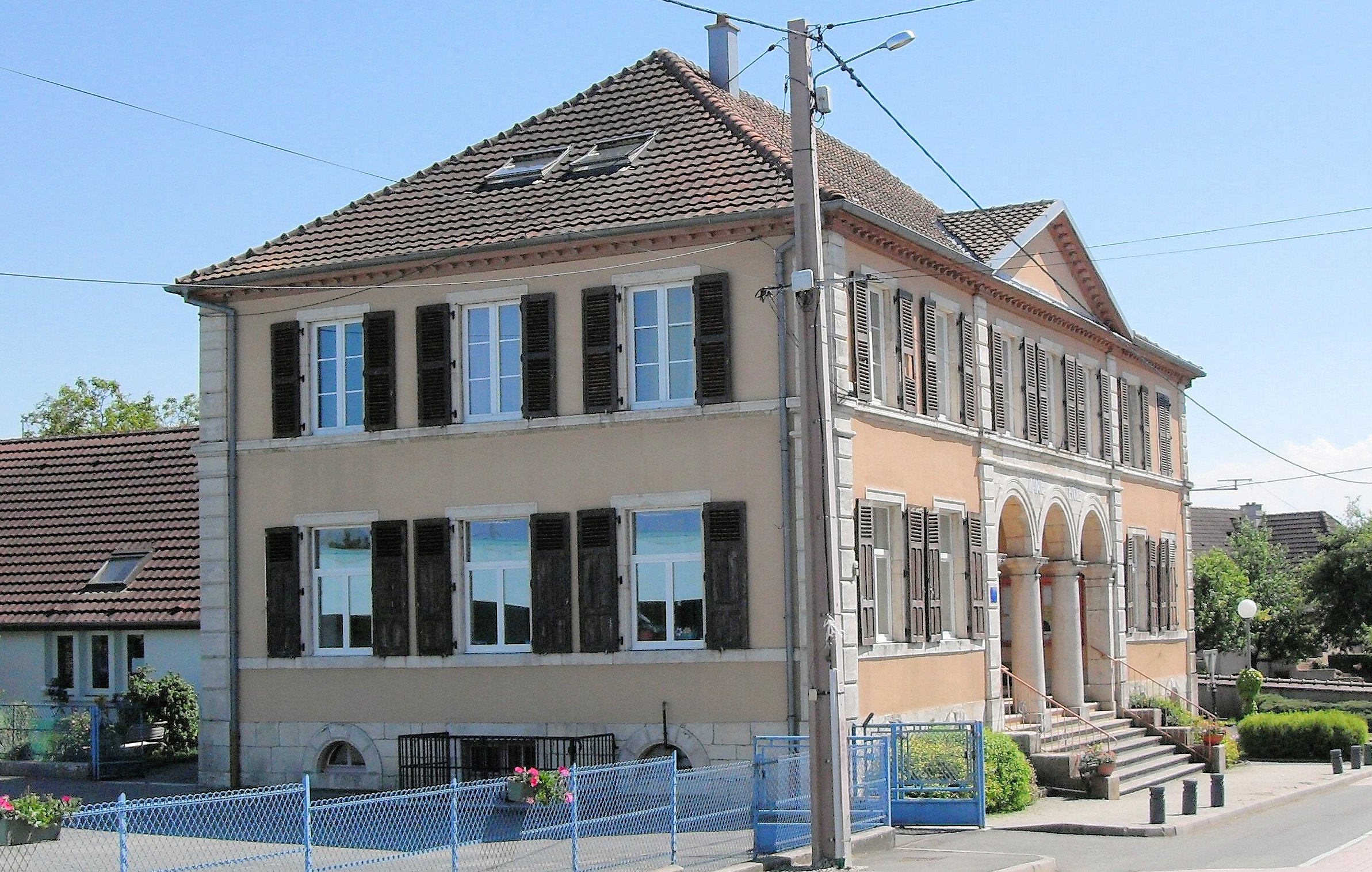 La mairie-école de Suarce